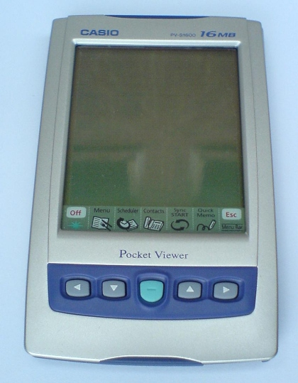 Bildbeschreibung: CASIO PV-S1600 Quelle: selbst fotografiert Fotograf/Zeichner: Audacia Datum: 20.05.2006